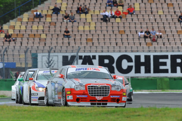 Matteo Cressoni al volante della Chrysler 300C sul circuito del Nurburgring (Germania)